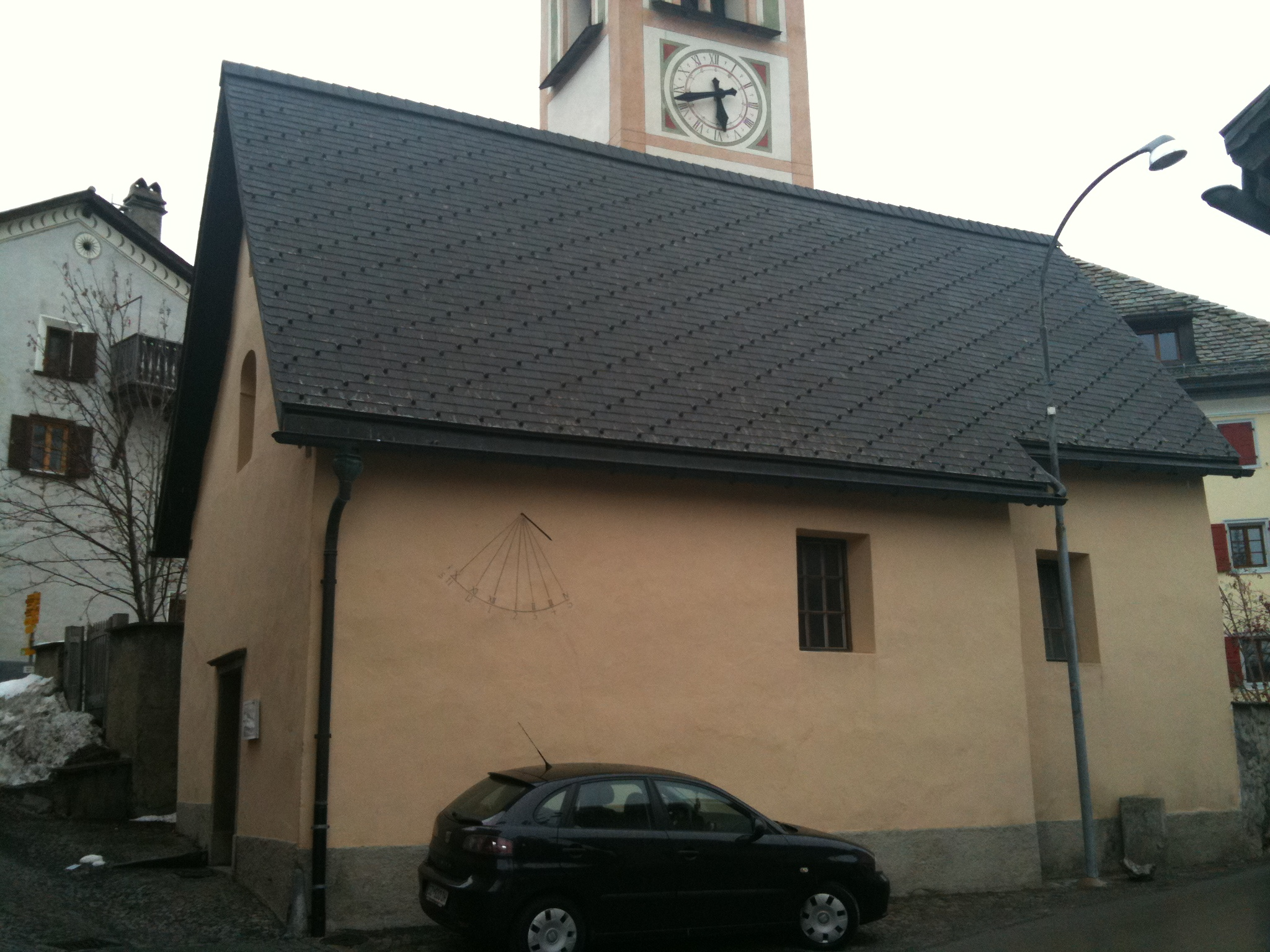 reformierte Kirche mit Sonnenuhr, in Madulain im Kanton Graubünden